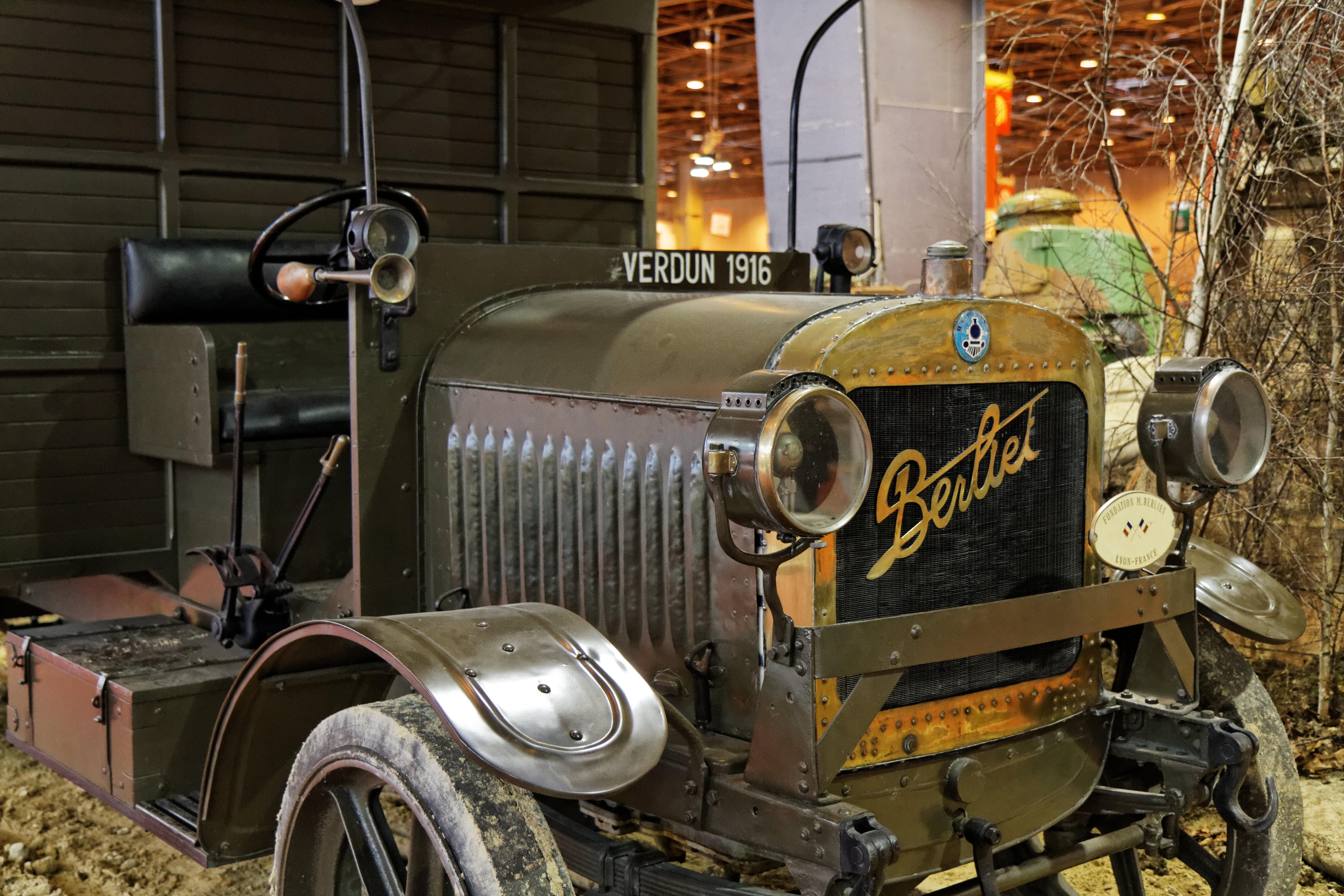 Un Berliet type CBA présenté lors du salon Retromobile 2014.